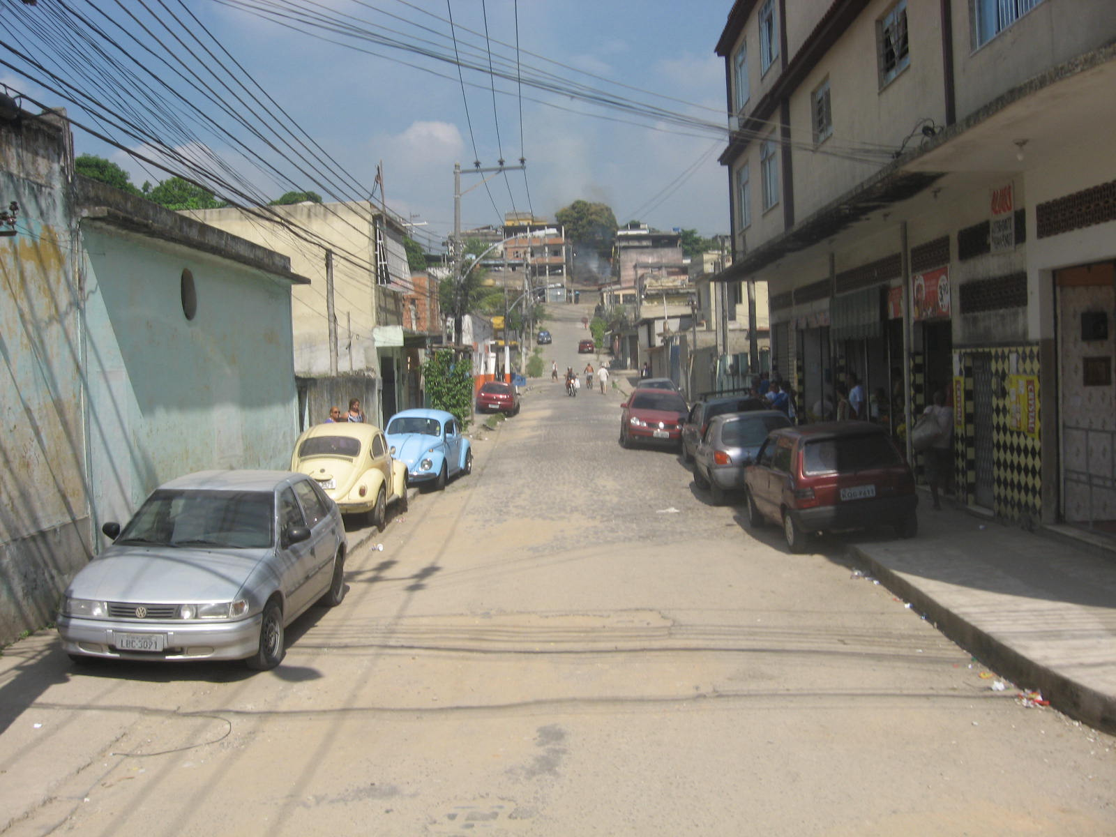 Vista do bairro meritiense de Vila Rosali.